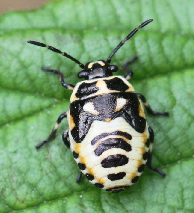 Nymphe der Kohlwanze (Eurydema oleracea) am 27.6.2017 in der Schwetzinger Hardt